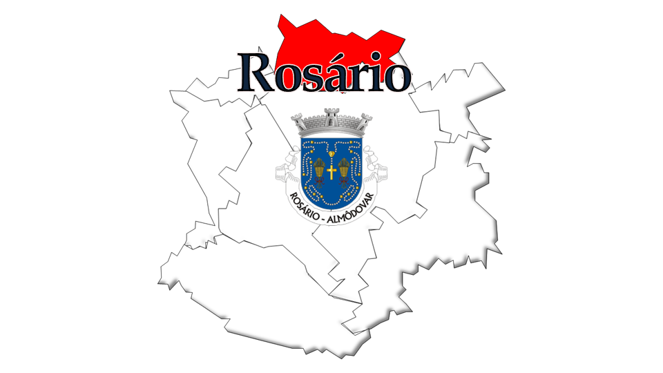 Evolução da População